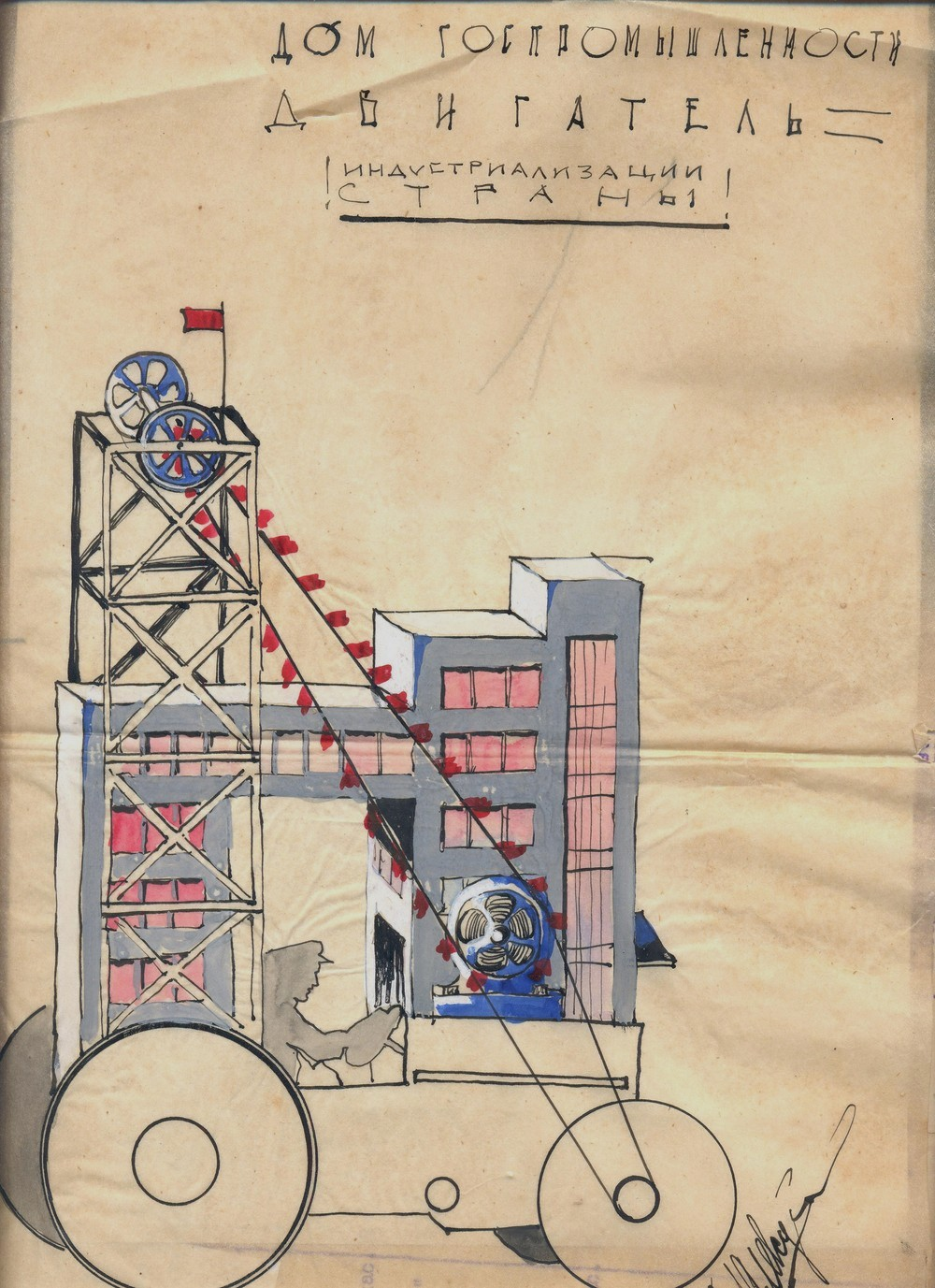 Ескіз “карнавального трактора”, направлений до робочого комітету будівництва Будинку Держпромисловості на затвердження (трактор мав бути застосований під час урочистих заходів, присвячених завершенню будівництва). 26 жовтня 1928 р. Ф.Р. – 1432, оп. 1, спр. 529, арк. 24